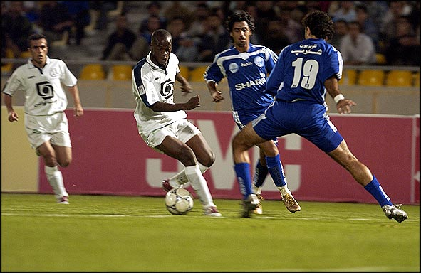 استقلال با دوگل سامره به پرسپولیس سلام كرد